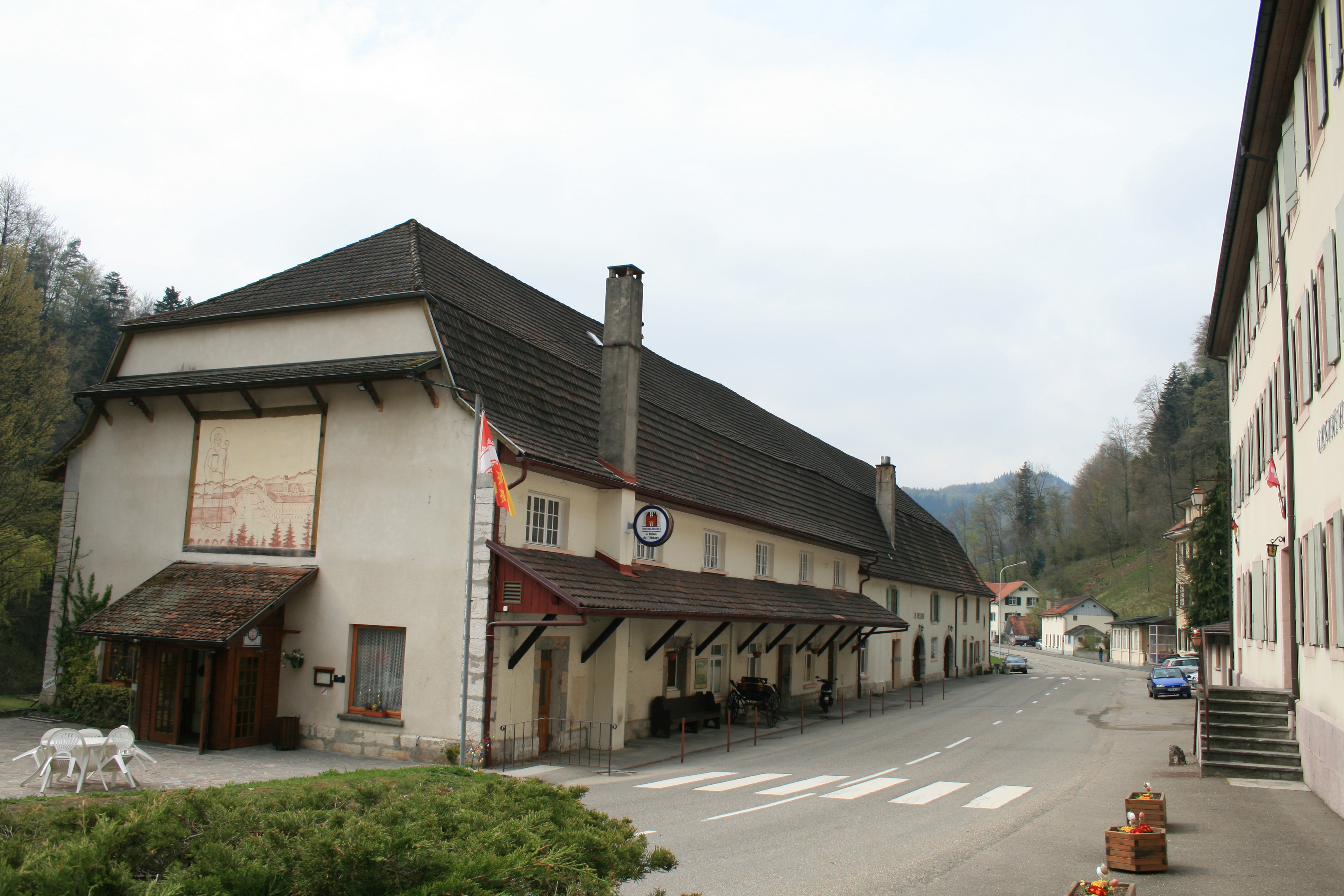 Caveau, Lucelle, Alsace